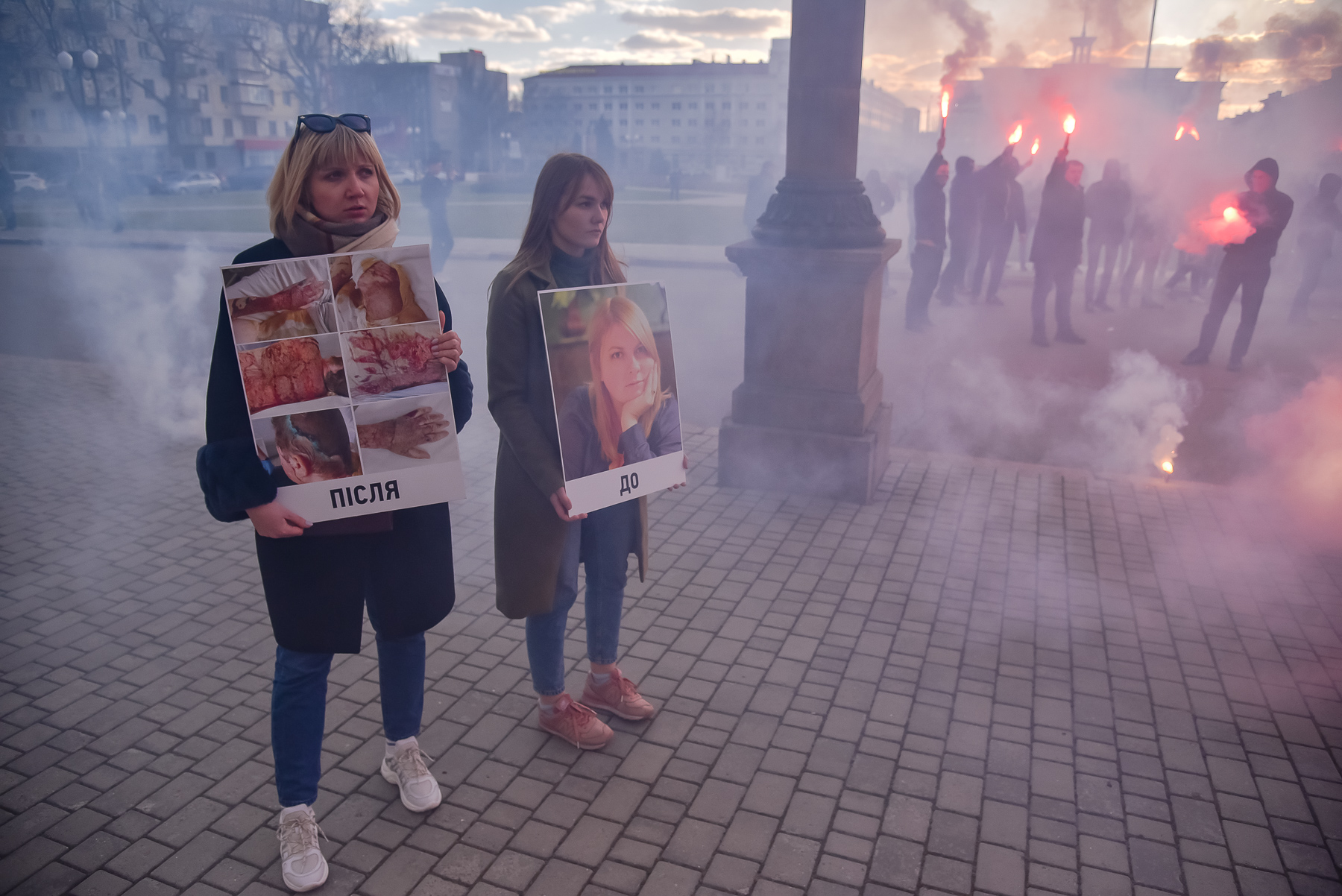 В Херсоні активісти та друзі Катерини Гандзюк провели кілька акцій, щоб нагадати - замовники вбивства Гандзюк досі на волі.